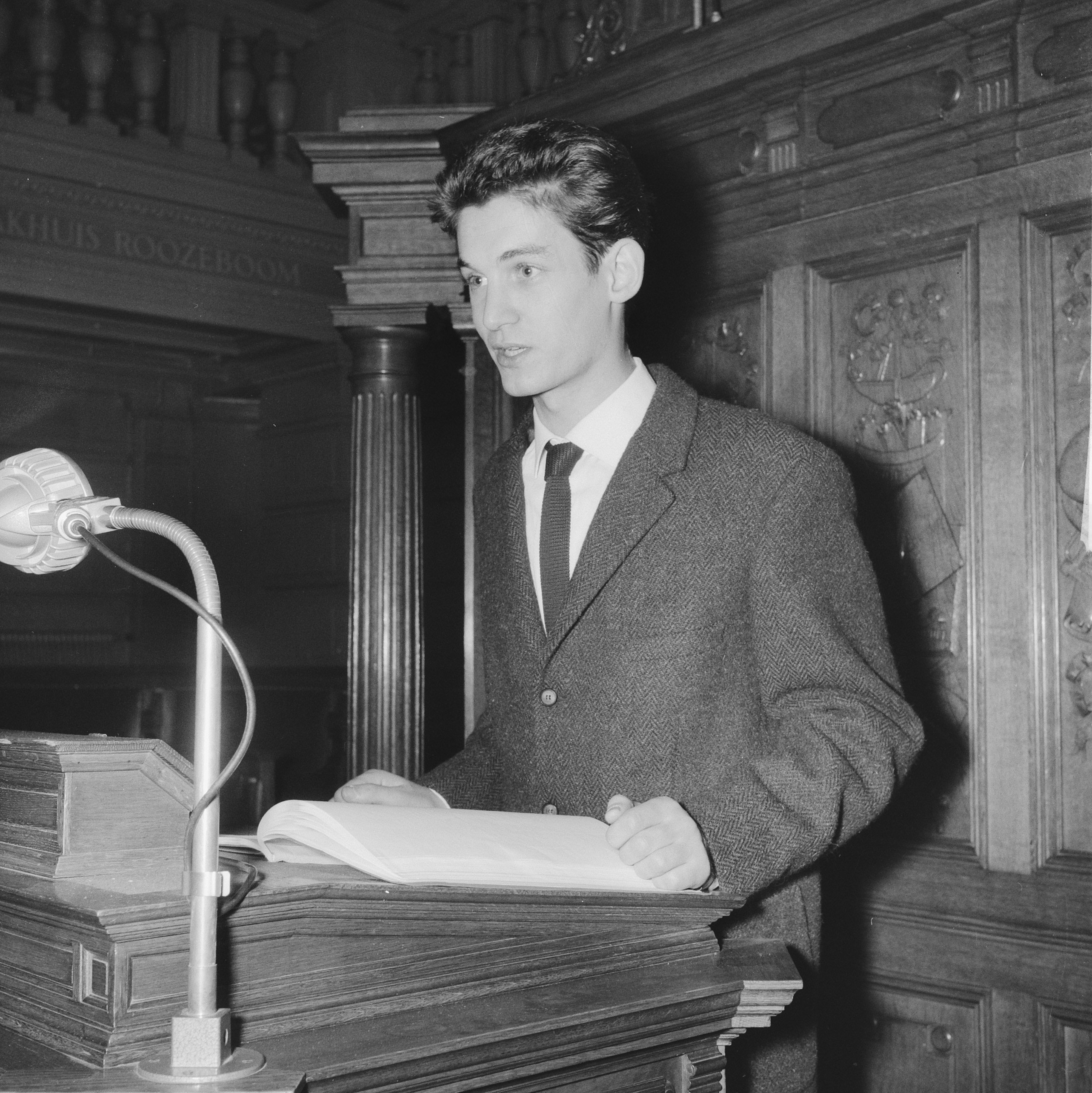 Collectie / Archief : Fotocollectie Anefo Reportage / Serie : Reina Prinsen Geerligsprijs 1961 Beschrijving : Uitreiking Reina Prinsen Geerligsprijs. Prijswinnaar Peter van Gestel leest voor uit eigen werk Datum : 24 november 1961 Locatie : Amsterdam, Noord-Holland Trefwoorden : auteurs, literatuur, prijsitreikingen, schrijvers Persoonsnaam : Gestel, Peter van Fotograaf : Nijs, Jac. de / Anefo Auteursrechthebbende : Nationaal Archief Materiaalsoort : Negatief (zwart/wit) Nummer archiefinventaris : bekijk toegang 2.24.01.03 Bestanddeelnummer : 913-2227